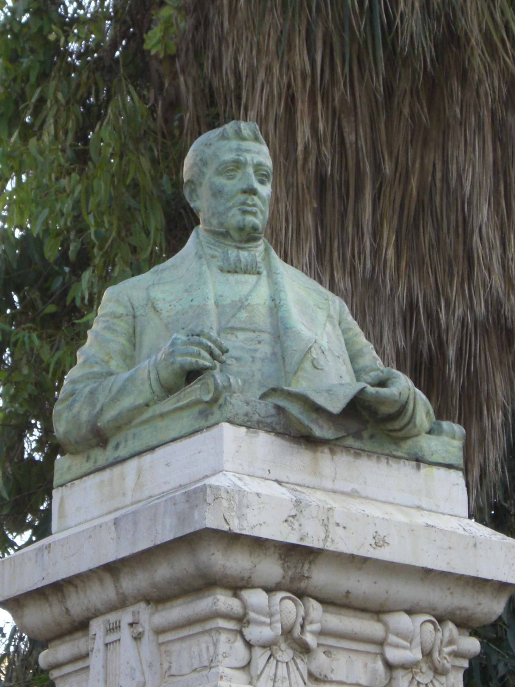 Bust de Bernat i Baldoví, situat al parc de l'Estació de Sueca